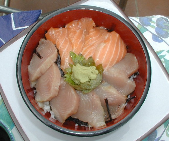 Chirashi Foto che ho scattato sulla mia terrazza a Roma il 12.5.02. Il chirashi è stato eseguito da un'amica giapponese. Categoria:Immagini di cucina e alimenti